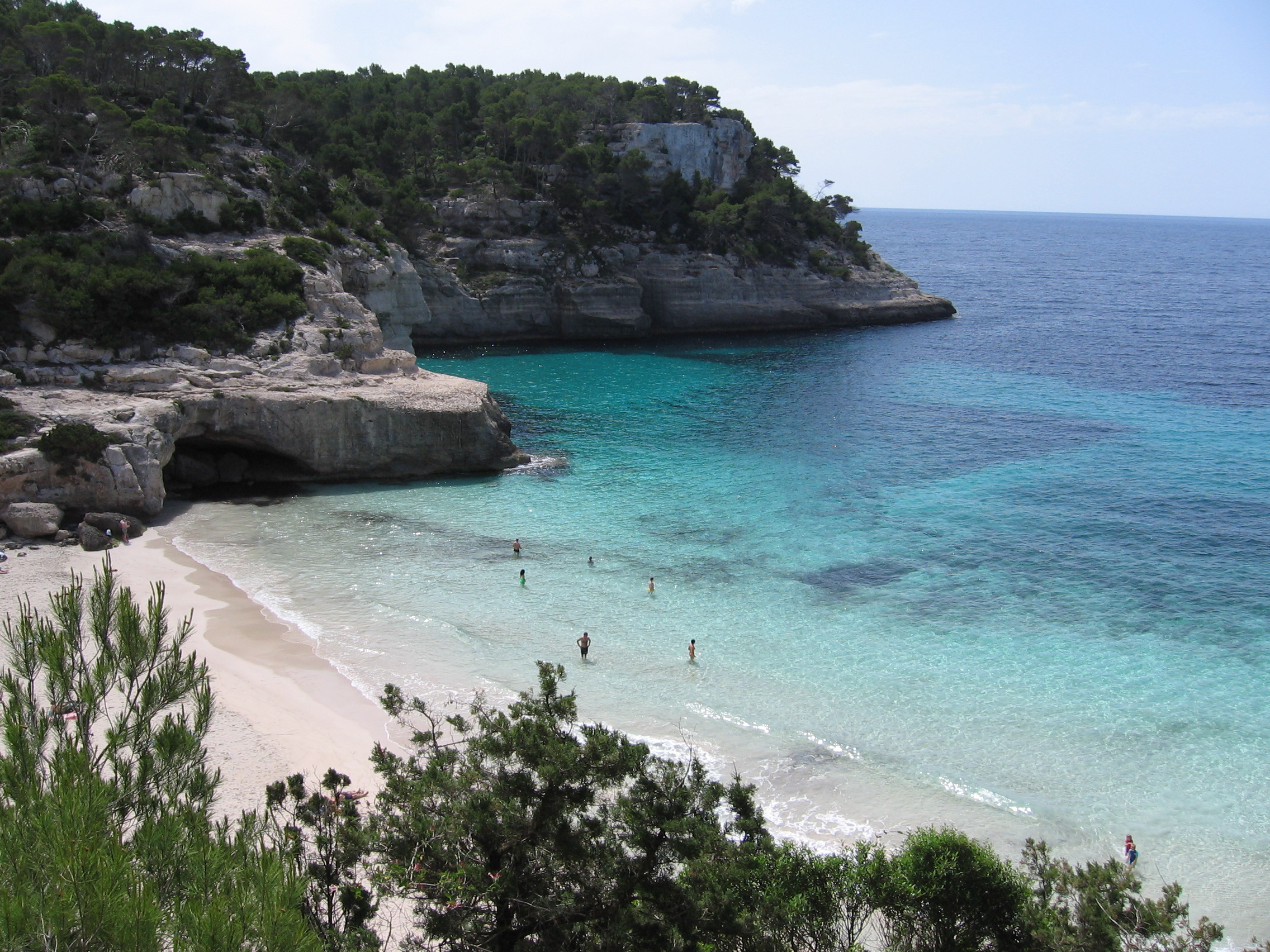 Cala Mitjana